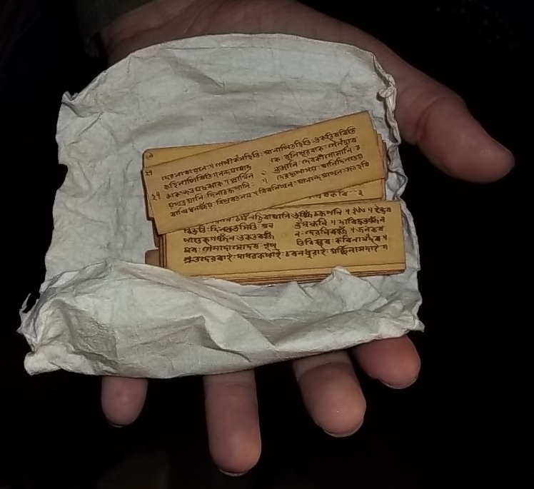 অসমীয়া: শ্রীশ্রীবেঙেনাআটী সত্রৰ যাদুঘৰত সংৰক্ষিত আটাইতকৈ সৰু(আনুমানিক)হাতৰ মুঠিতে লুকুৱাব পৰা সাঁচিপাতত লিখিত গুণমালা পুথি।